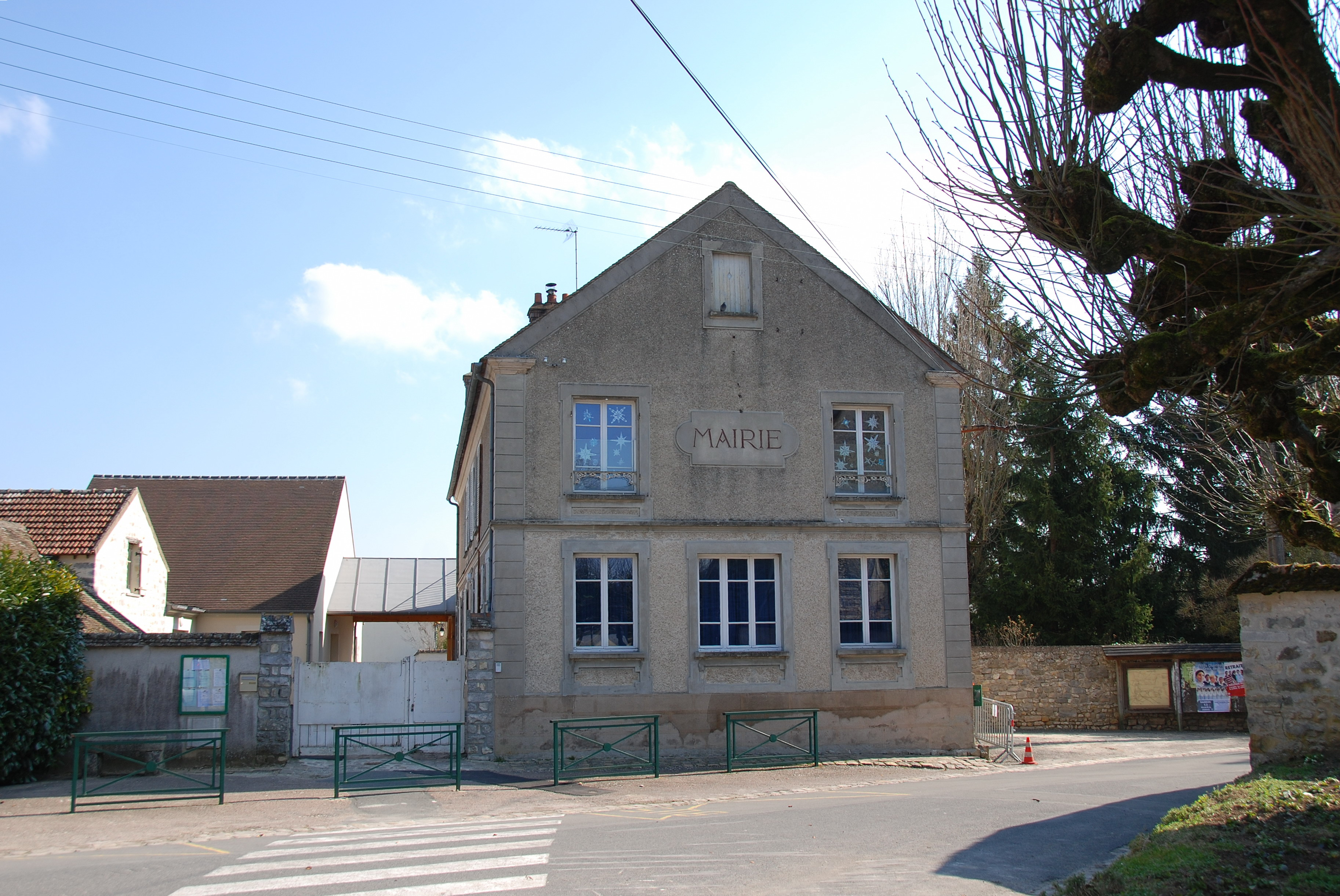 L'ancienne mairie de Recloses (Seine-et-Marne, région Île-de-France).